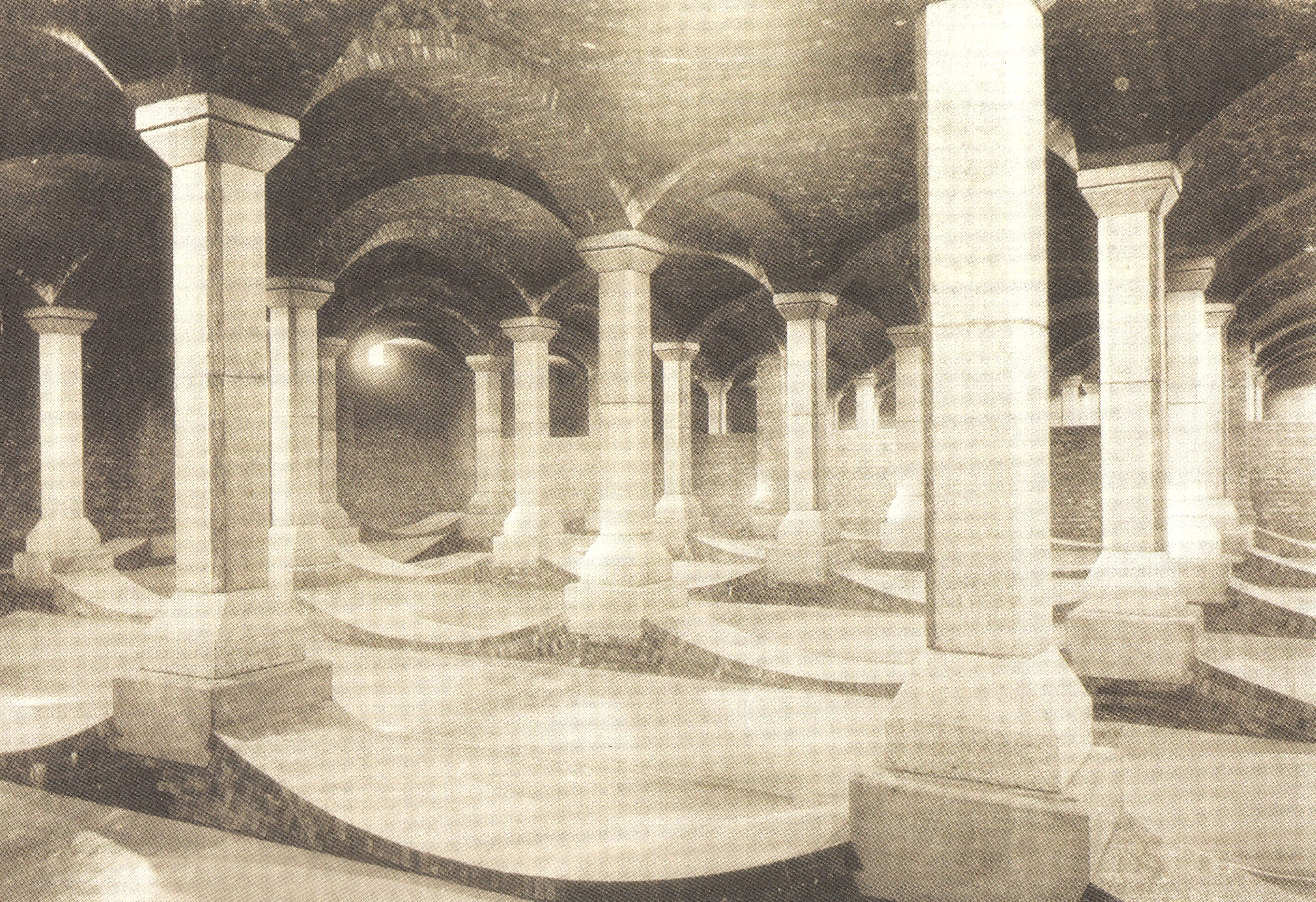 Wnętrze filtra powolnego bez złoża Stacja Filtrów w Warszawie